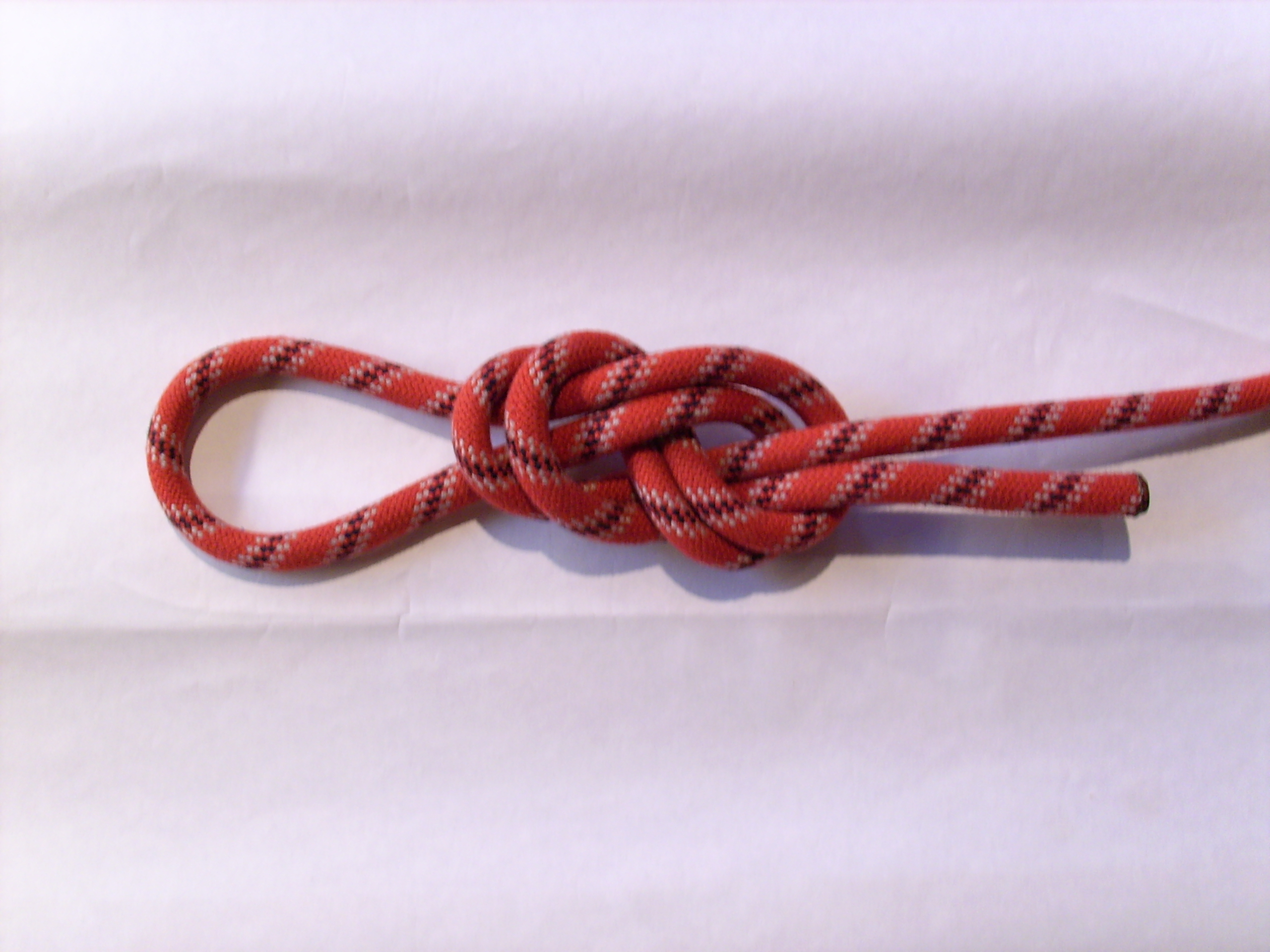 Kletter-Knoten, Seglerknoten